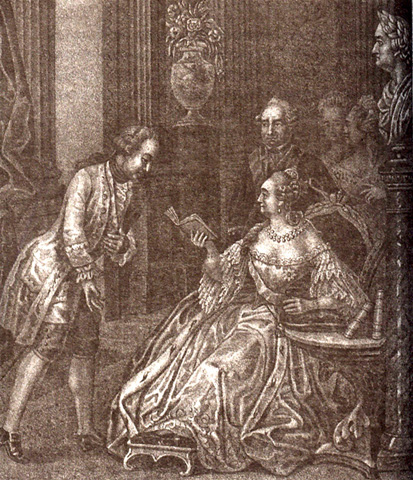 «Ломоносов представляется Елизавете Петровне»